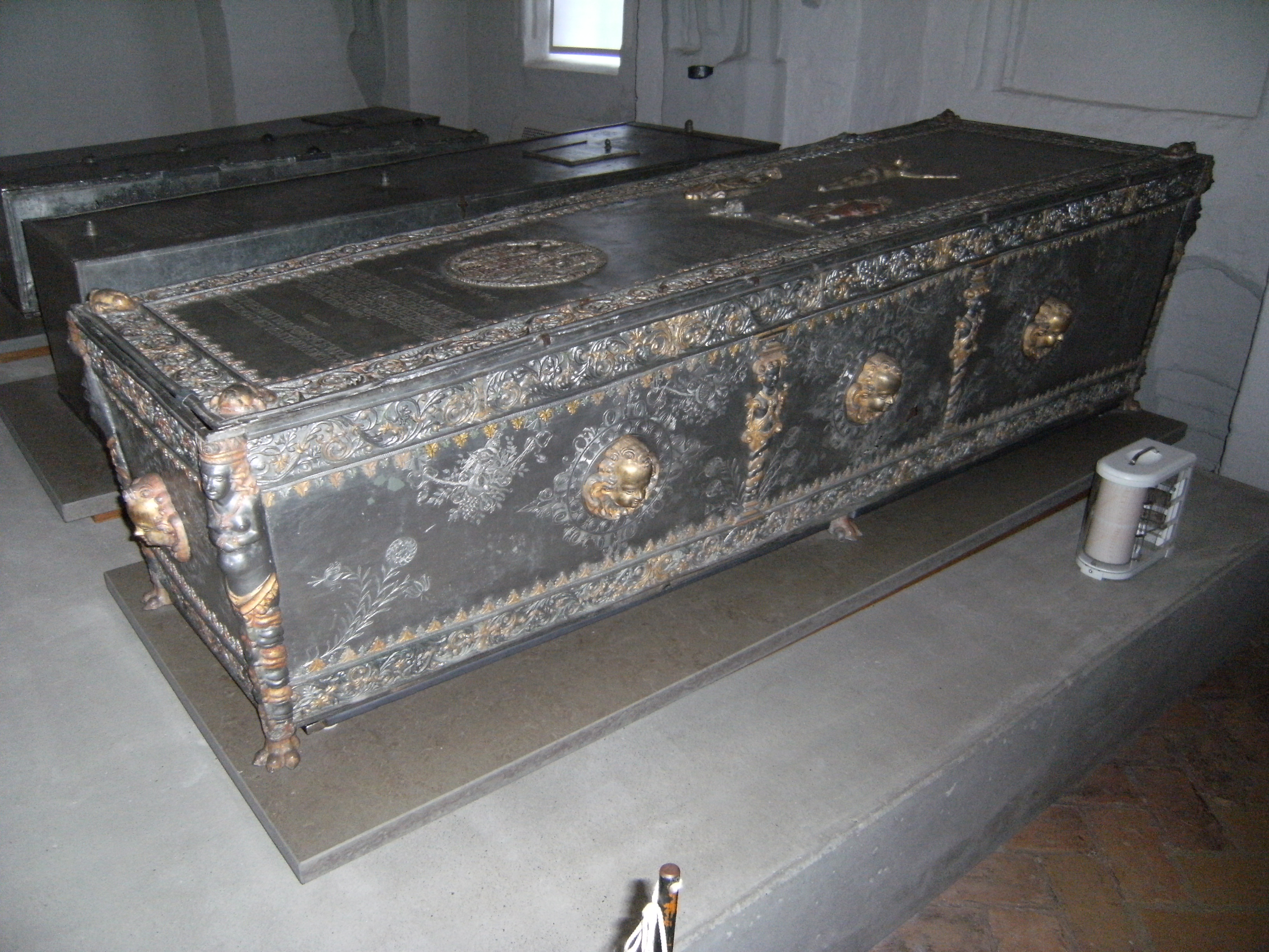 Sarkophag von Herzog Ernst Ludwig